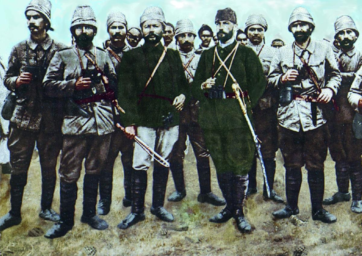 1912'de Mustafa Kemal